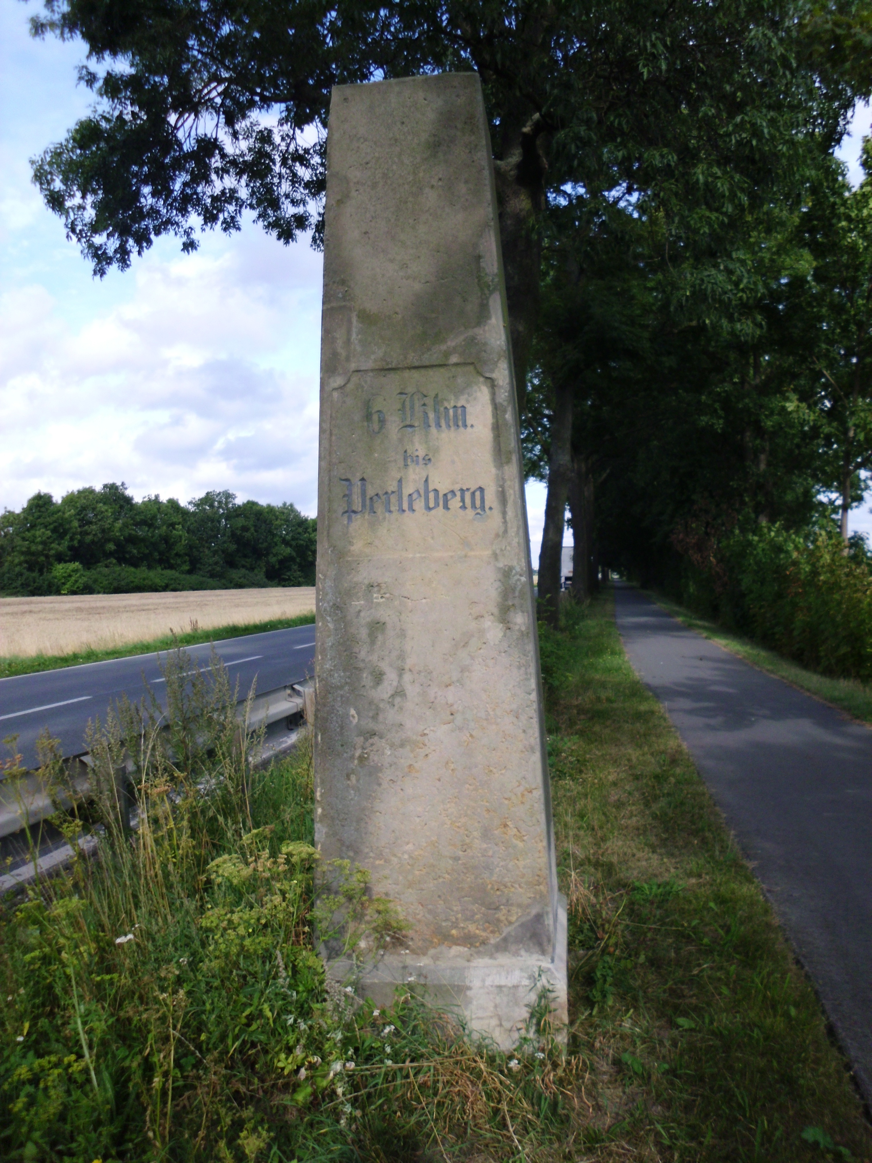 Kilometerstein bei der Kleinower Ziegelei, Amt Plattenburg, Landkreis Prignitz